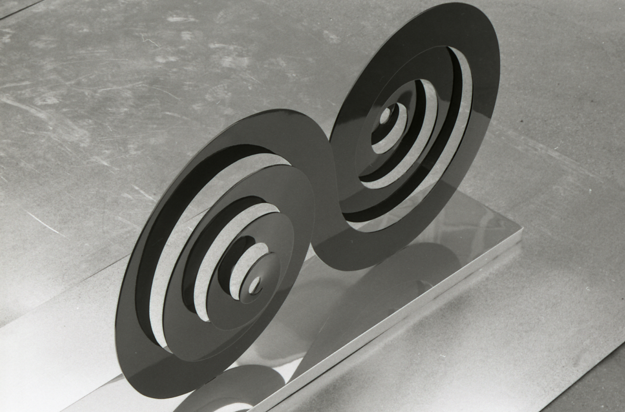 Servizio fotografico : Italia, 1971 / Paolo Monti. - Strisce: 7, Fotogrammi complessivi: 37 : Negativo b/n, gelatina bromuro d'argento/ pellicola ; 35 mm. - ((Sul portanegativi: NIKON FP4. - Fonte: Agenda di Paolo Monti: Monti - Agenda 1971 (1971), presso Archivio Paolo Monti